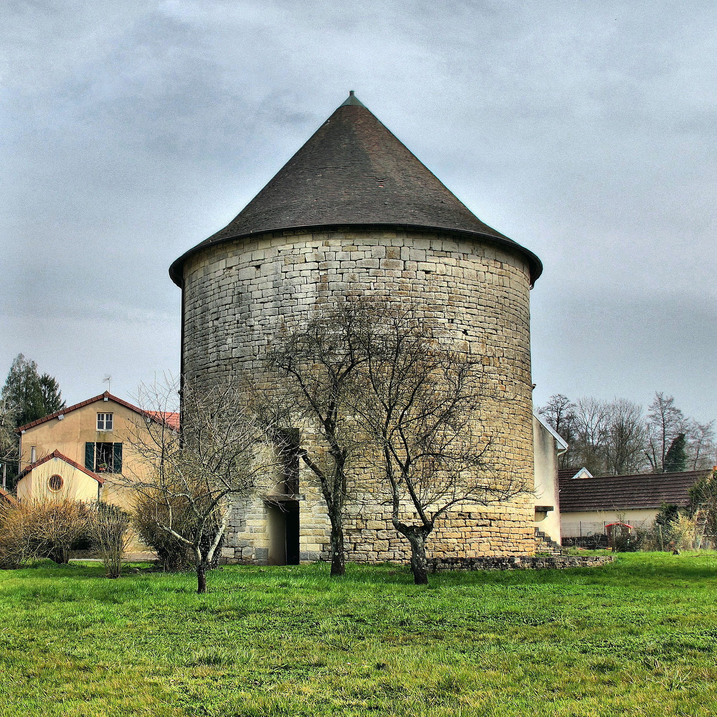 Inscrit aux monuments historiques sous le numéro PA00101983